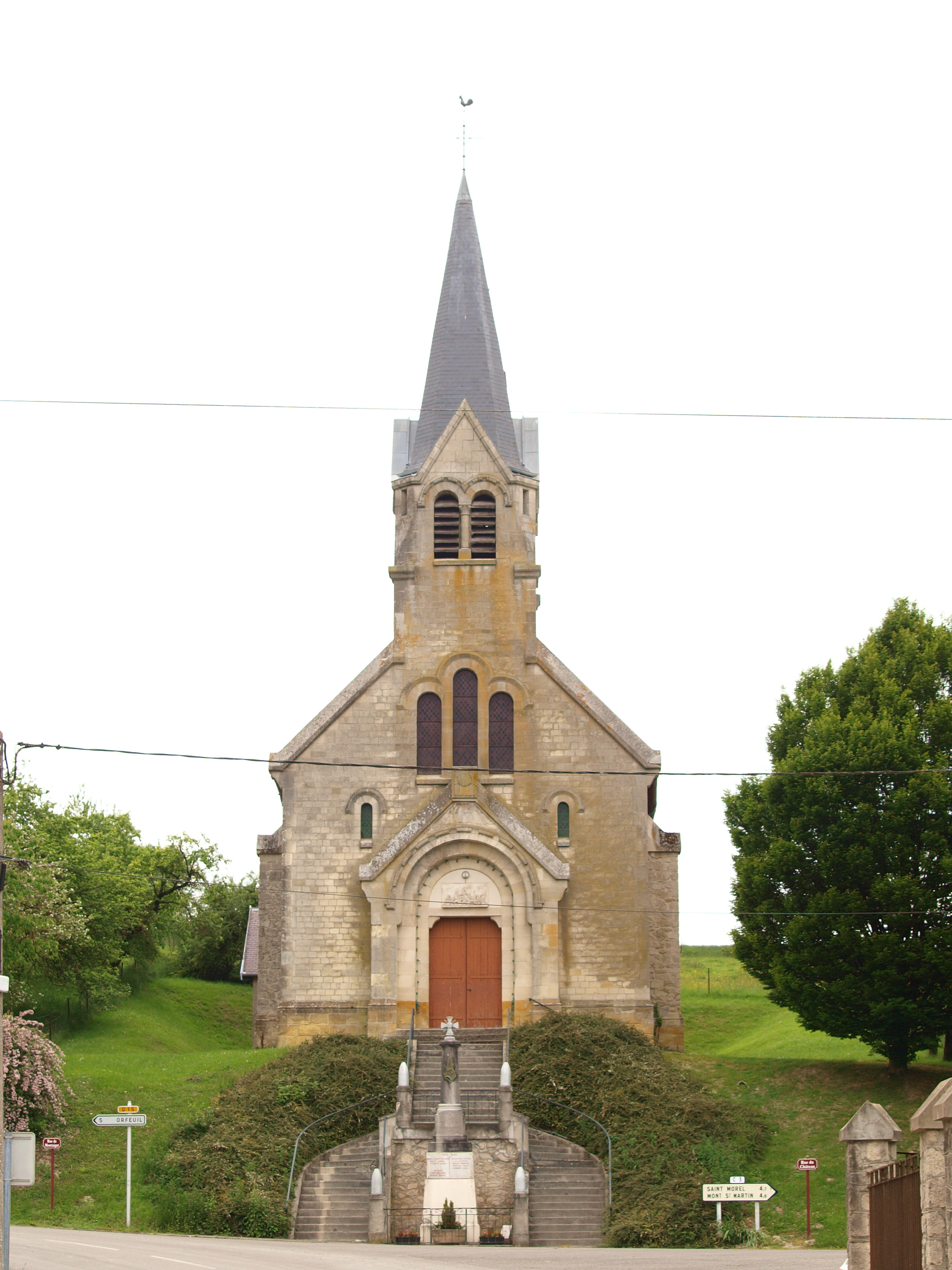 Liry (Ardennes, France)